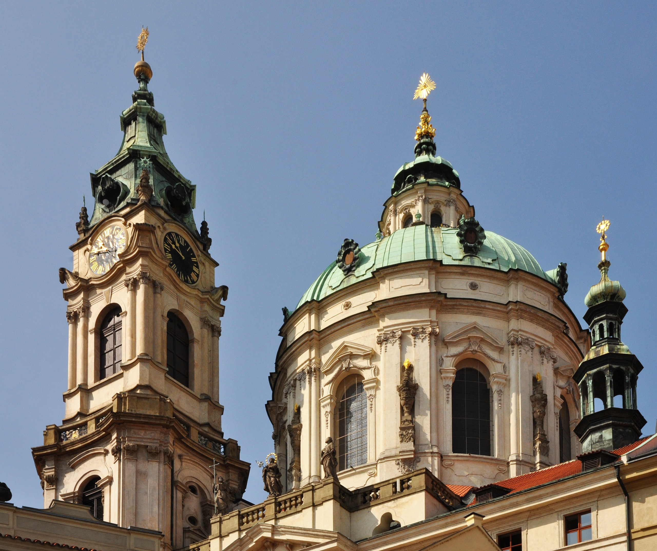 Klášter jezuitský, s kostelem sv. Mikuláše a zvonicí (Malá Strana)